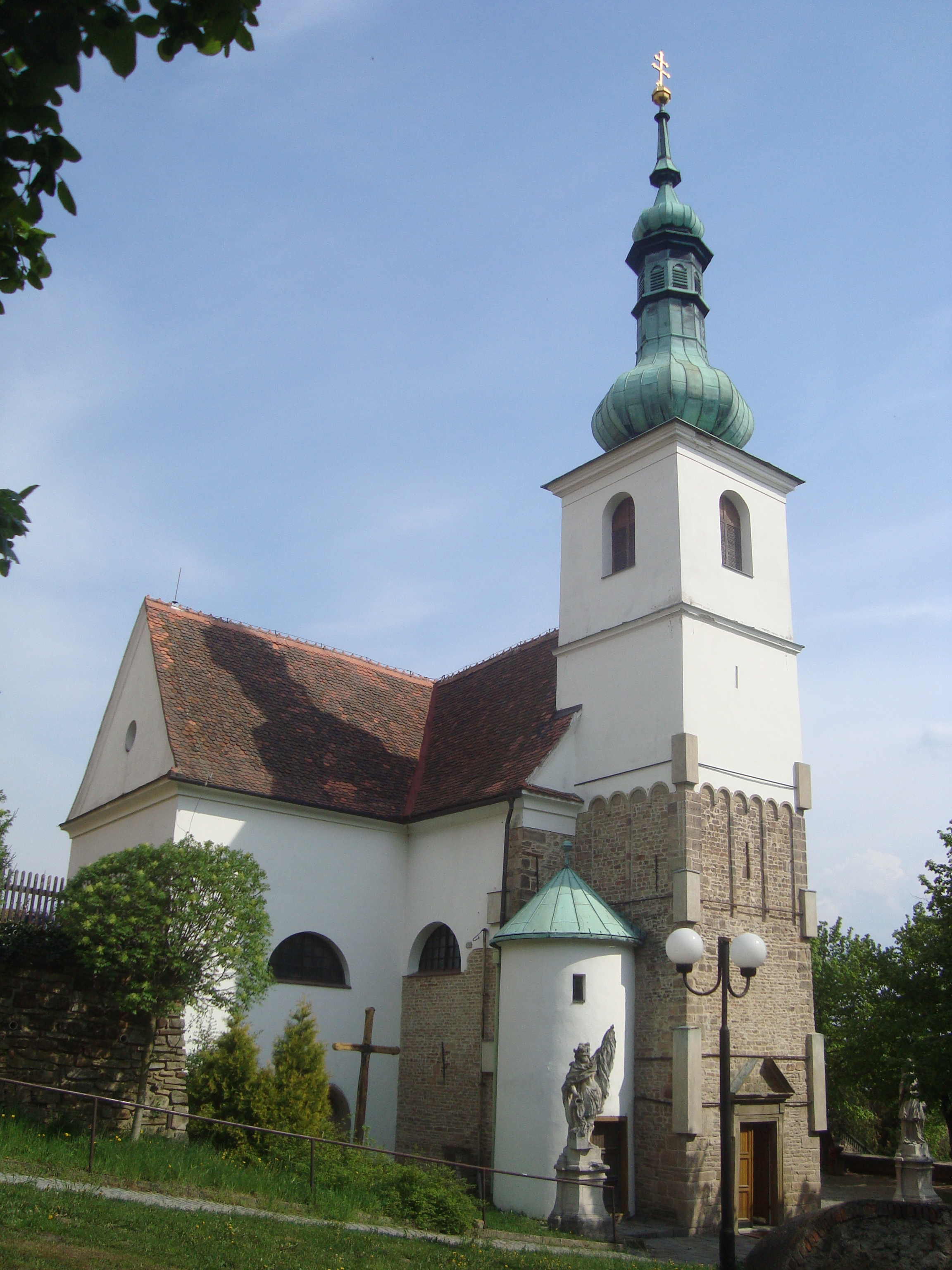 Rosice-farní chrám sv. Martina - pohled z ulice Kostelní